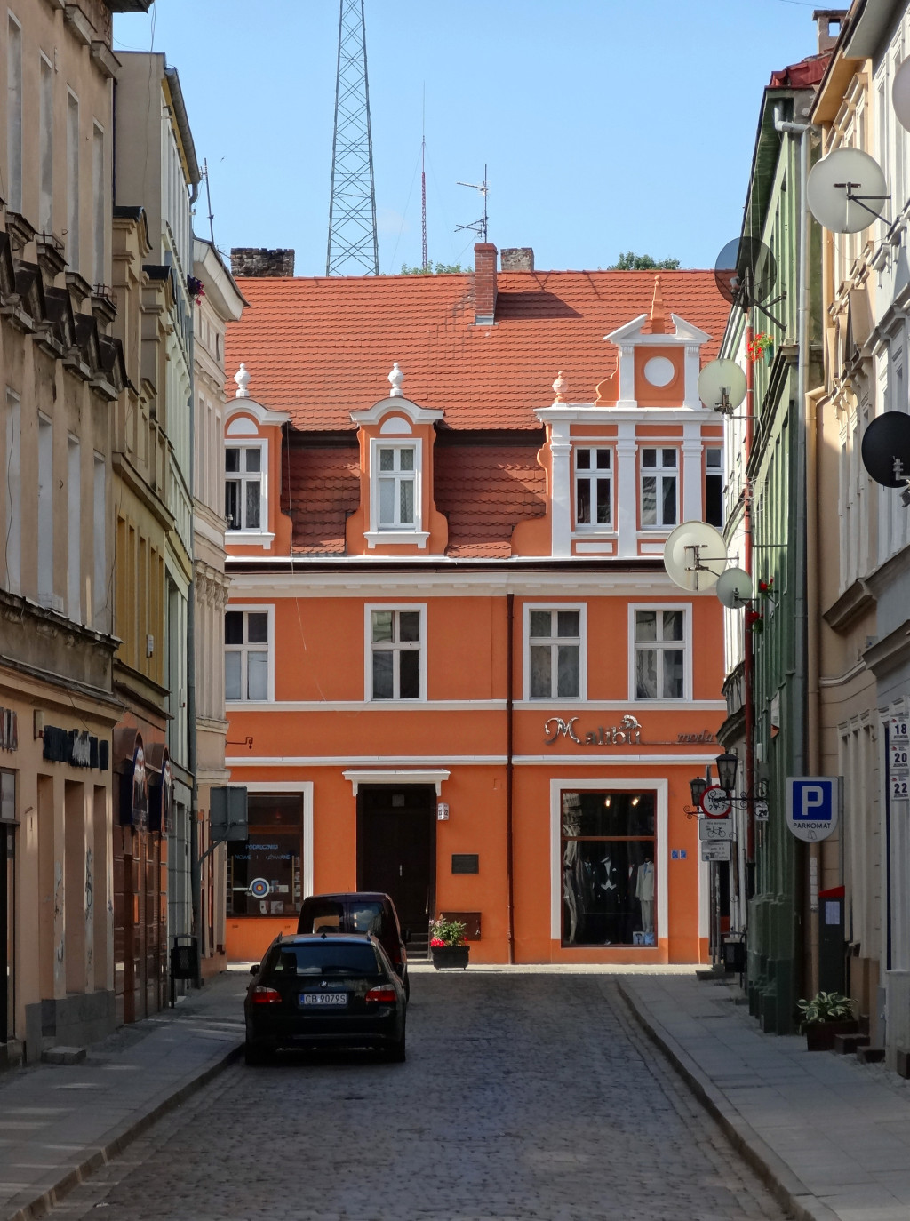 Kamienica przy ul. Długiej 17 w Bydgoszczy. Widok od ul. Jezuickiej